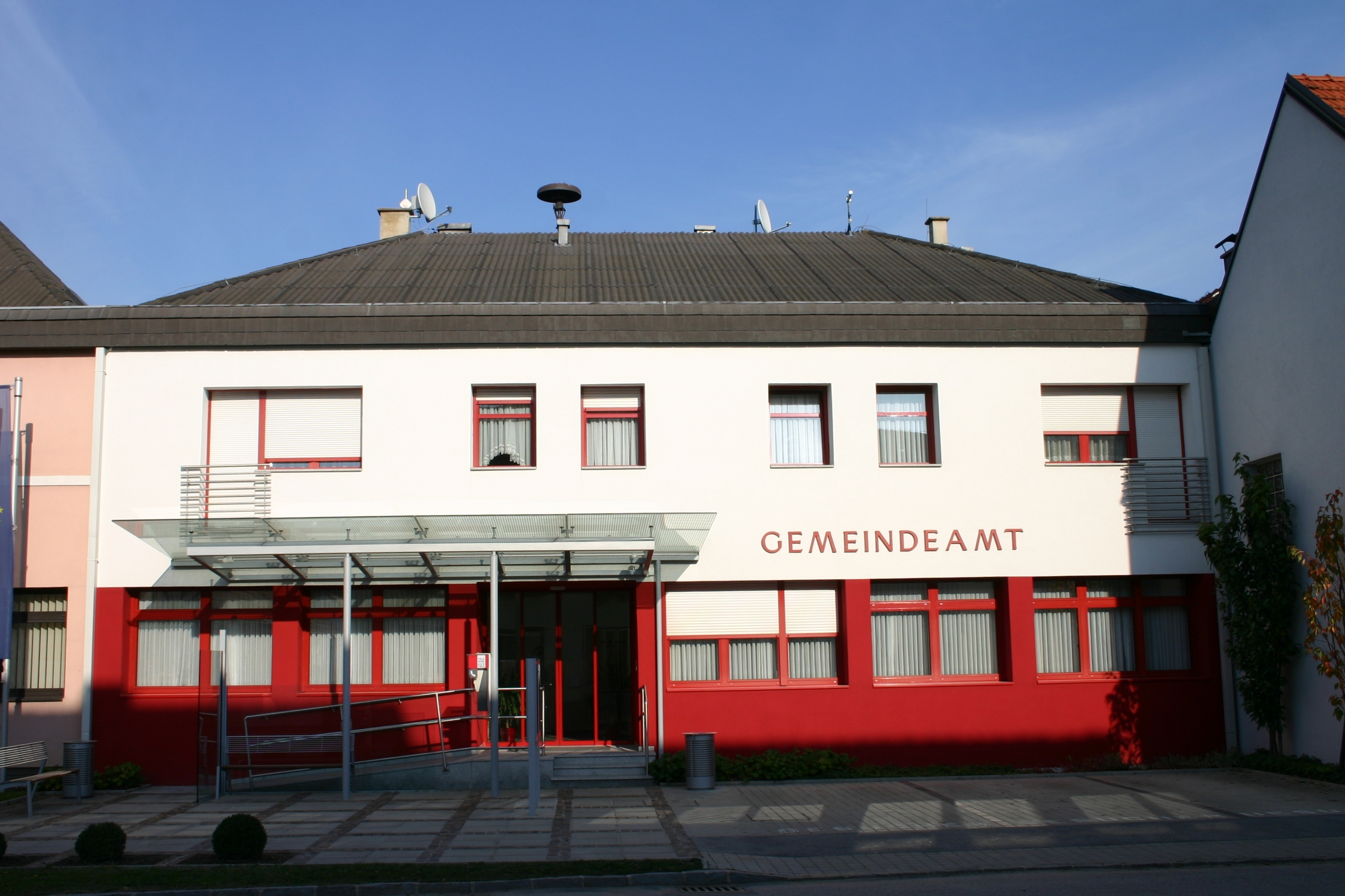 Neutal